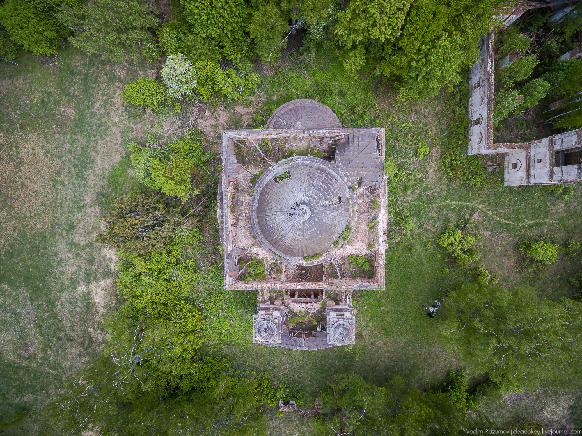 Переслегино. Церковь Петра и Павла. 1803 год. Архитектор Н.А. Львов. Тверская область.